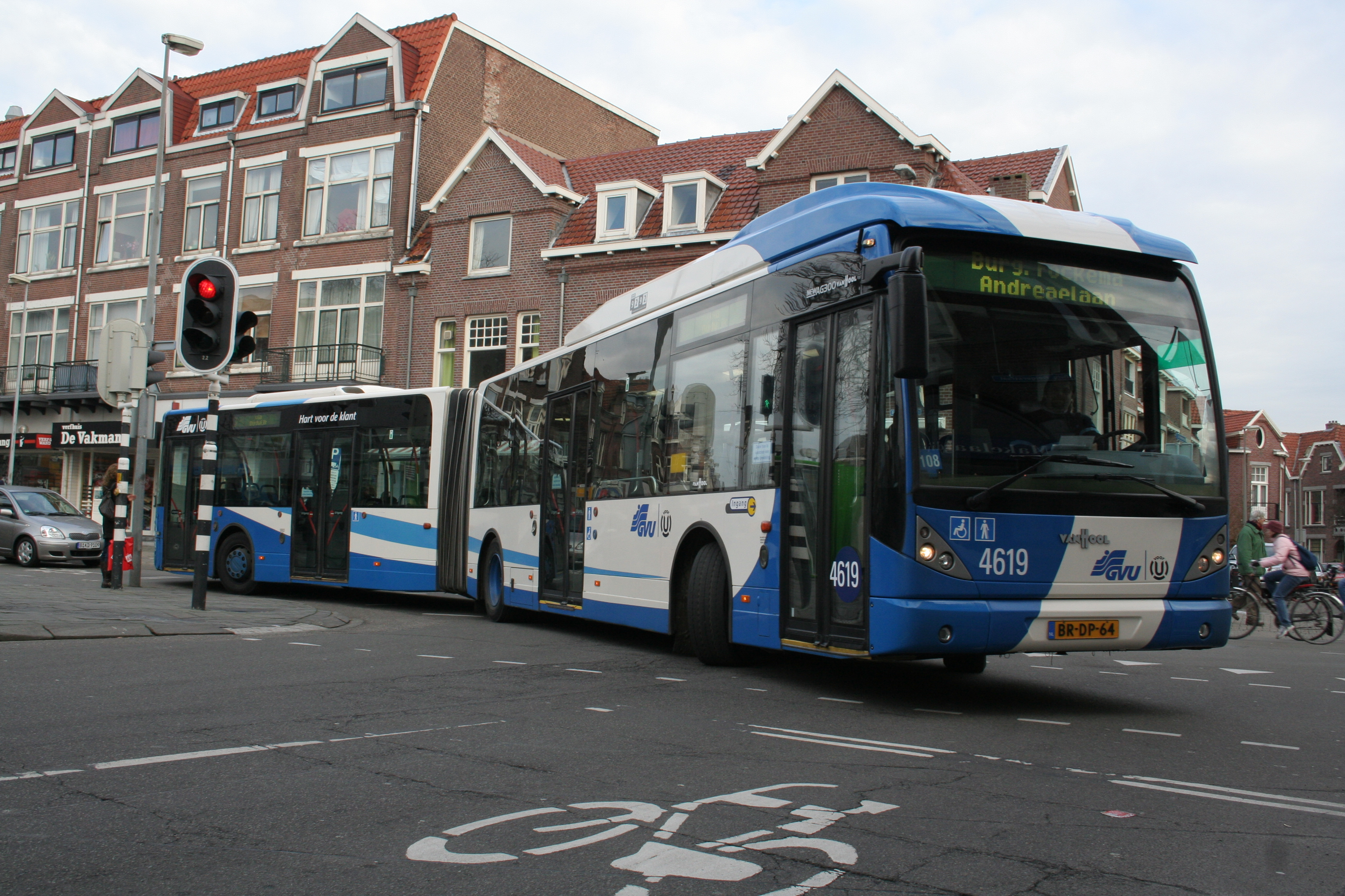 Een GVU-bus in Oudwijk, Utrecht.